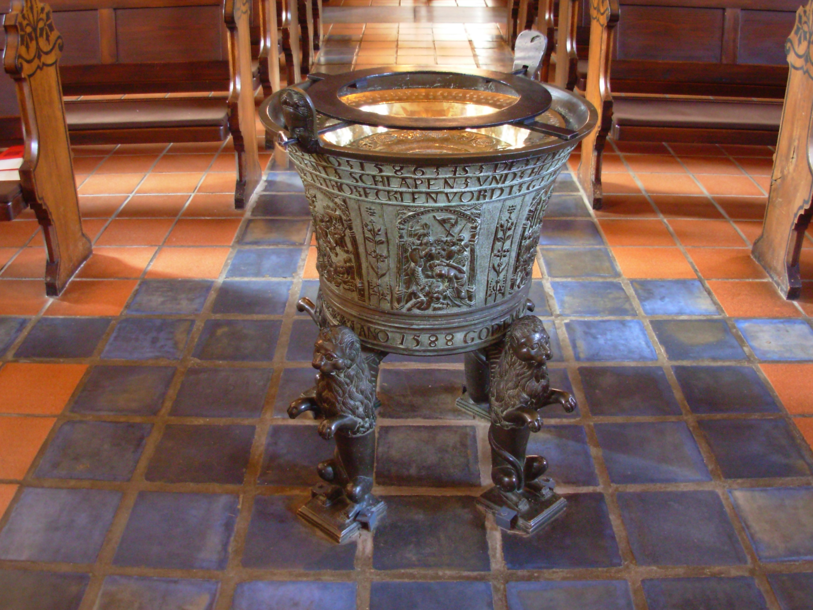 Eckernförde St. Nicolai Bronzefünte von 1588